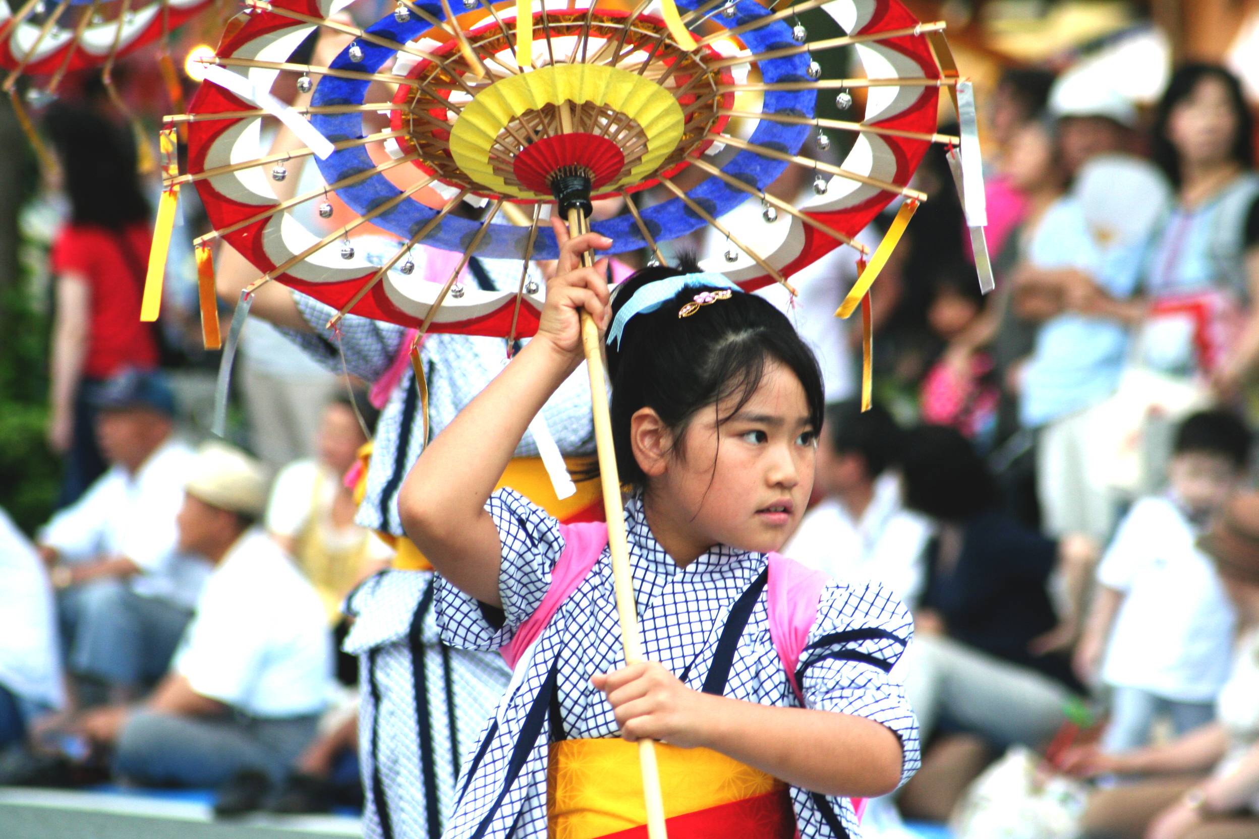 姫路お城祭。兵庫県姫路市にて毎年7月末から8月2日の3日間に渡り姫路城の南部大手前通りにて開催される祭である。第60回開催の2日目の祭の様子。